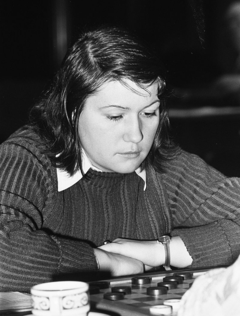 Elena Mikhailovskaya